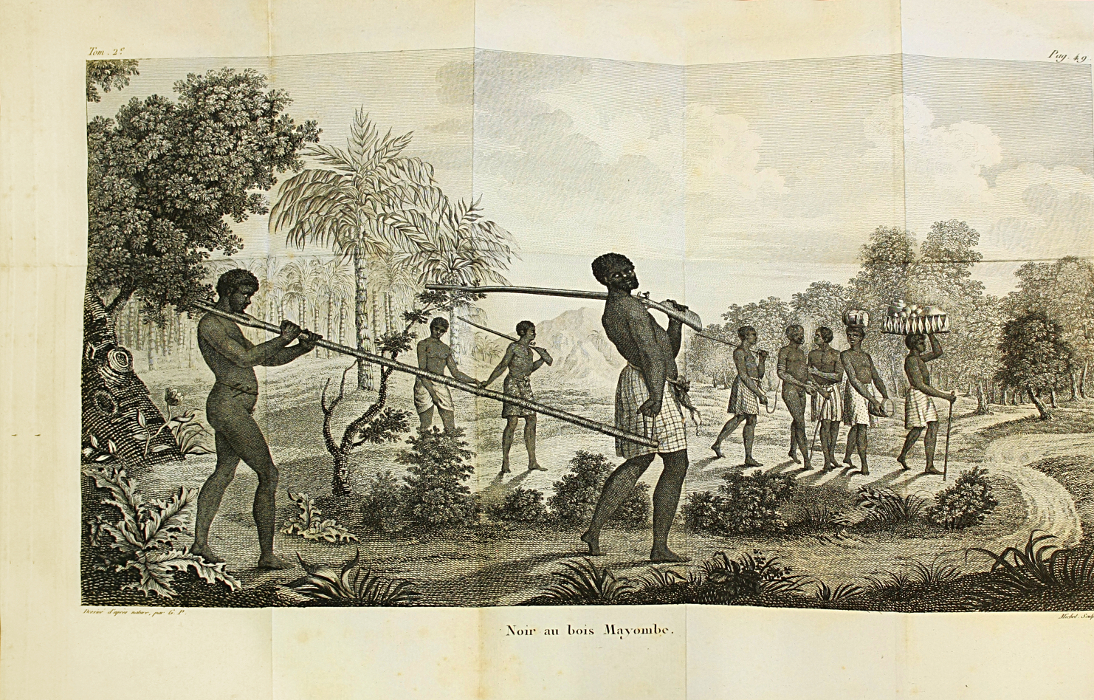 Captif maintenu par un carcan "Bois Mayombe" autour du cou. Il s'agit d'une fourche de bois maintenue par une cheville